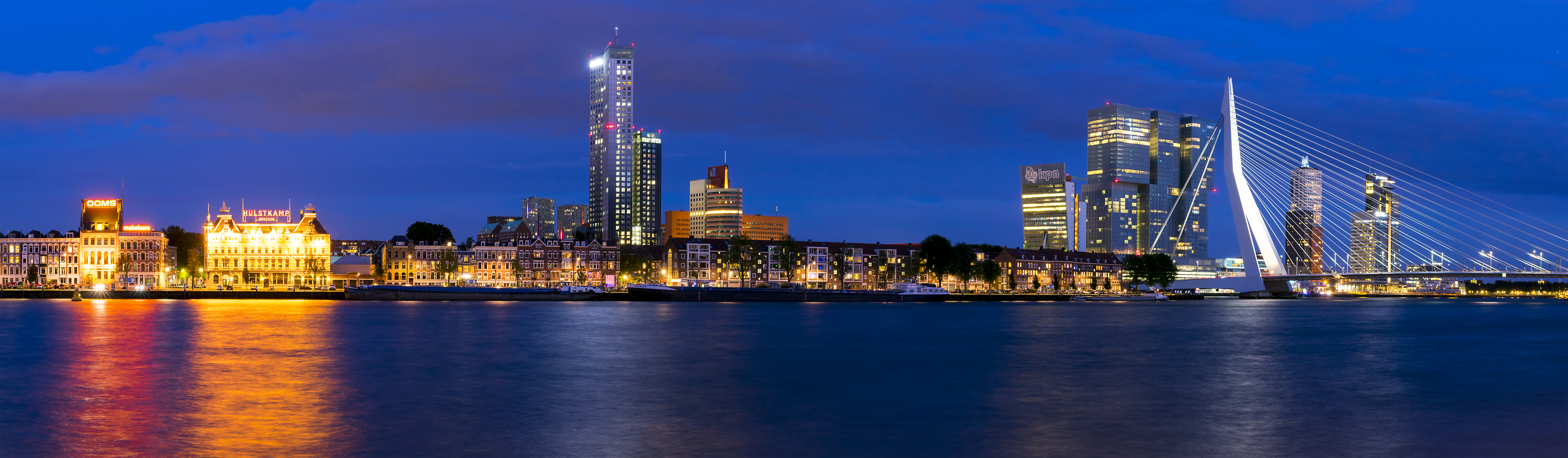 Panorama foto van de Erasmusbrug in Rotterdam. Deze foto is in 3 delen geschoten en later aan elkaar gezet met Lightroom